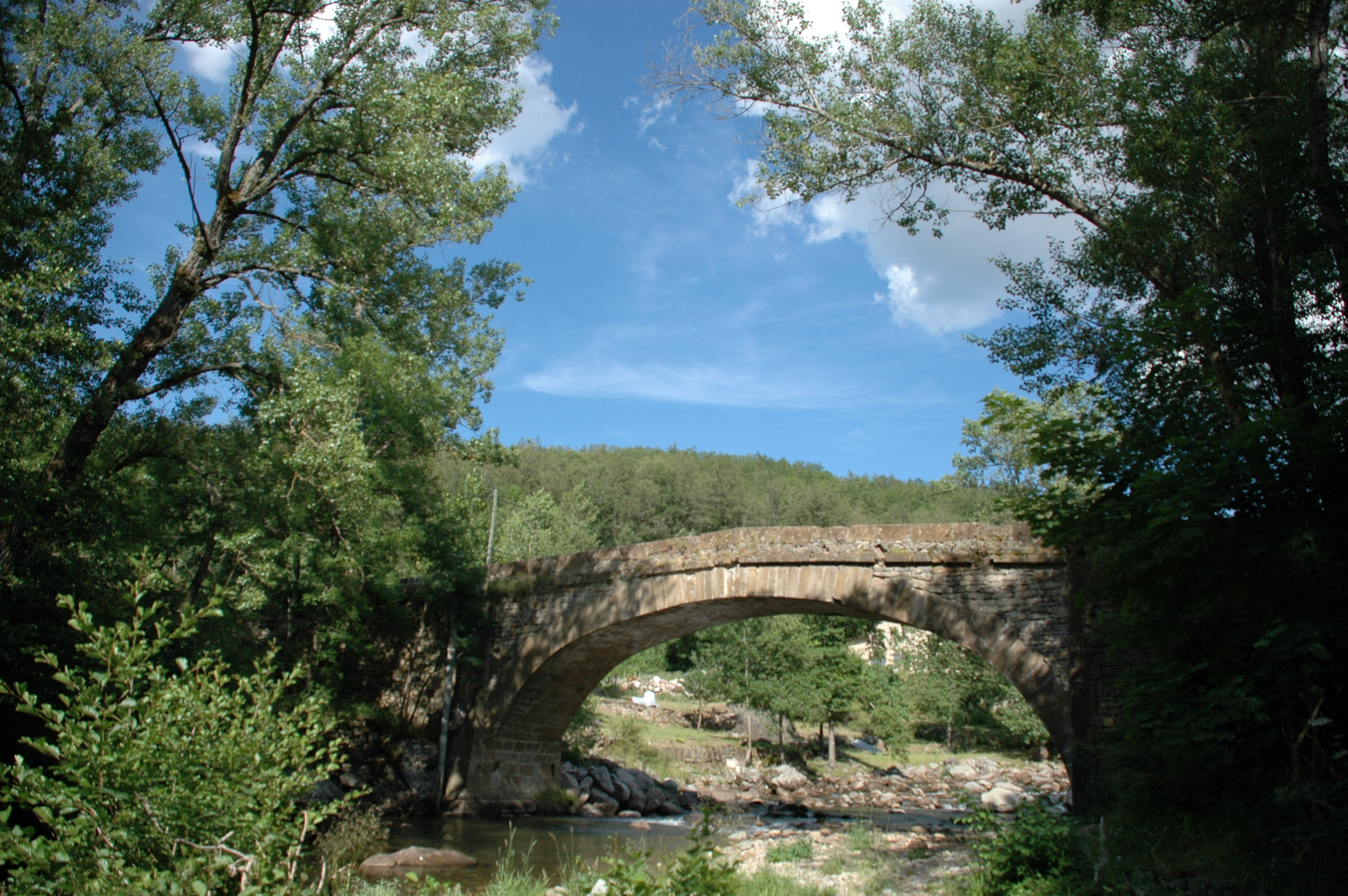 Un pont de pierre sur le Lot à Sainte-Hélène